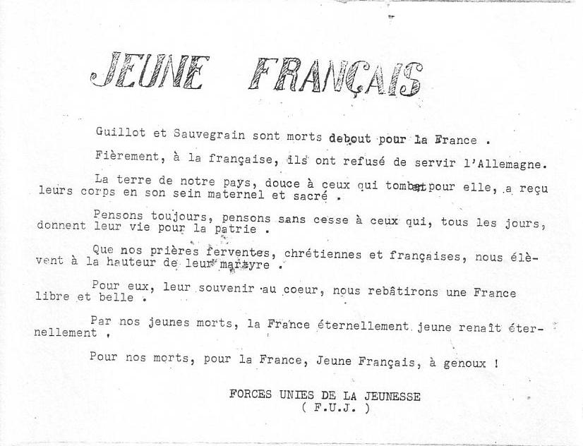 Tract du Front Uni de la jeunesse distribué à Toulouse Date : Novembre 1943 Collection particulière Catégorie:Résistance française